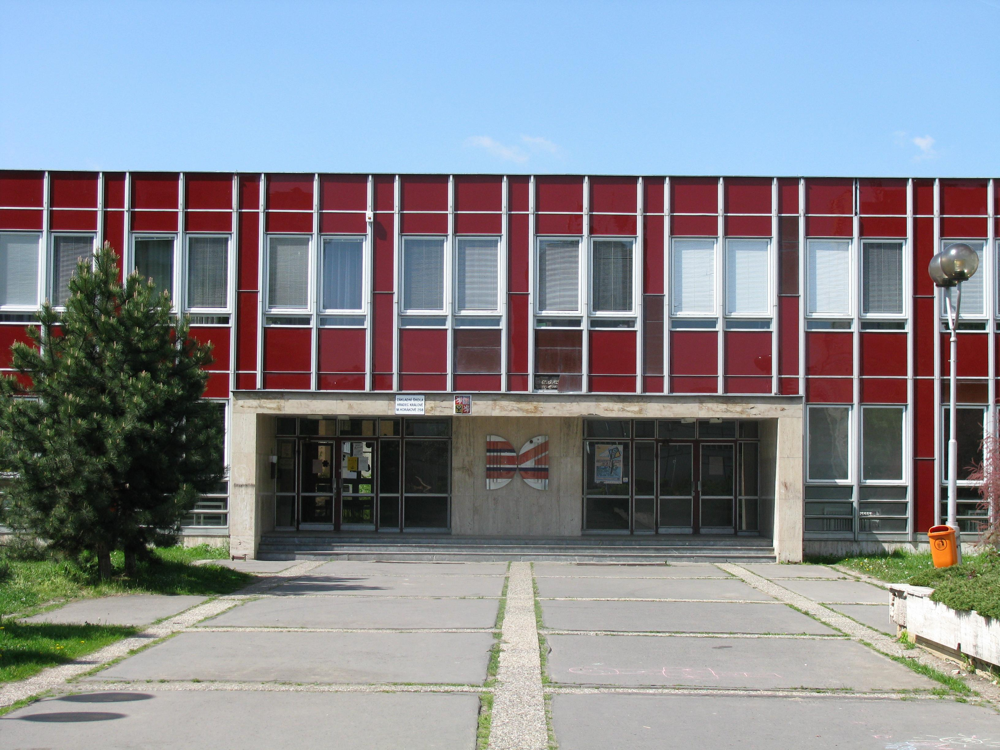 ZŠ Milady Horákové, Hradec Králové-Třebeš, Milady Horákové 258/50